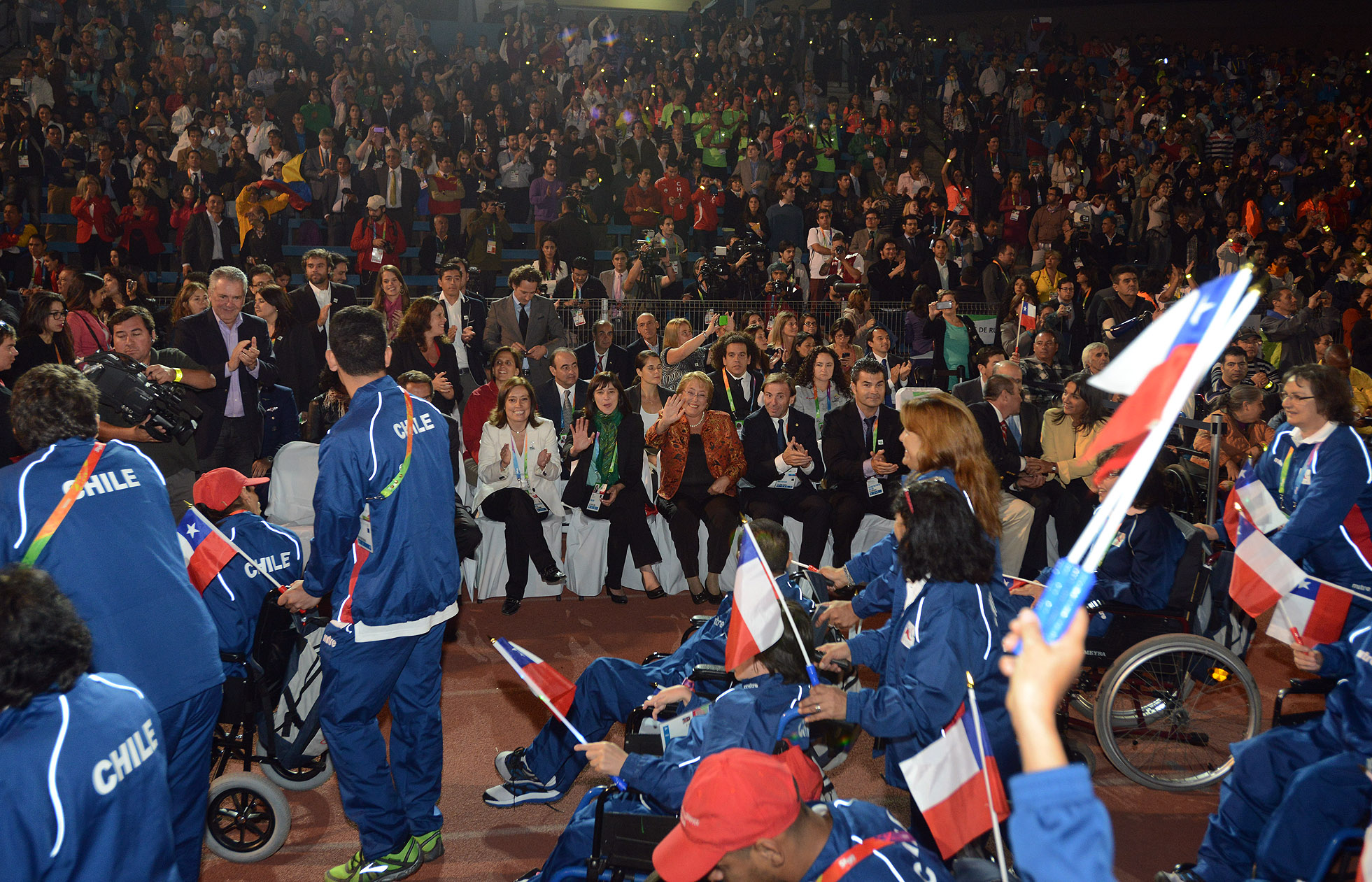 Presidenta Michelle Bachelet participó de la Inauguración de los Juegos Parasuramericanos Santiago 2014.